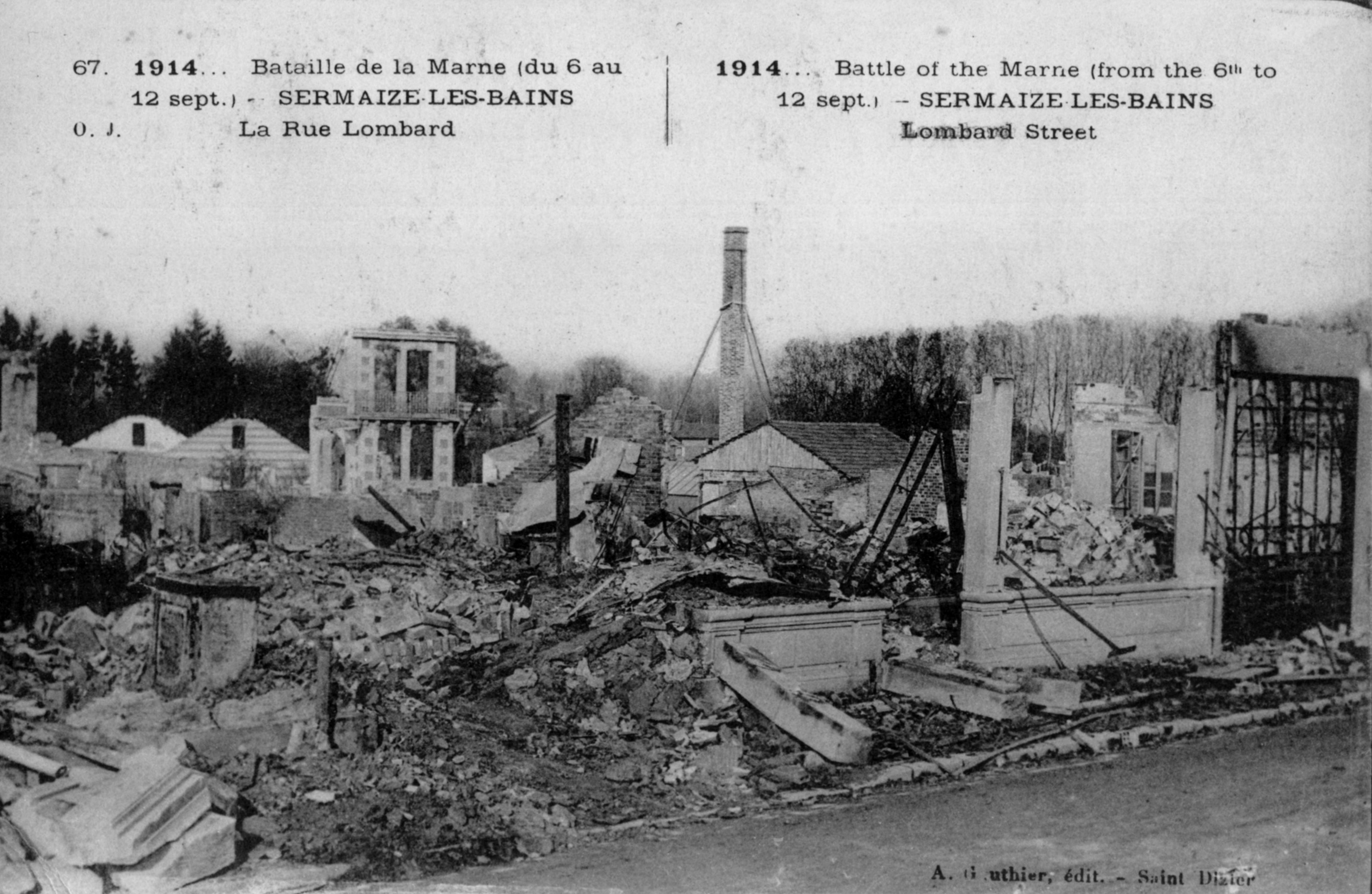 Sermaize-les-Bains. La rue Lombard après la Bataille de la Marne. Carte postale ancienne. A Gauthier, édit. Saint-Dizier.